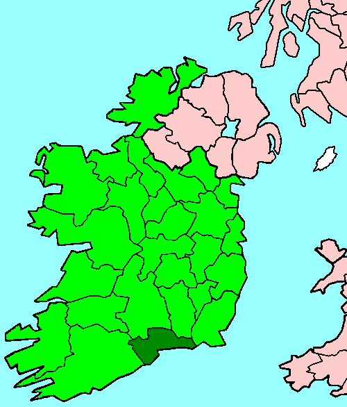 Waterford